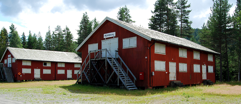 Depot, Heistadmoen leir. Bygd mellom 1900 og 1925(?). Freda 2004.